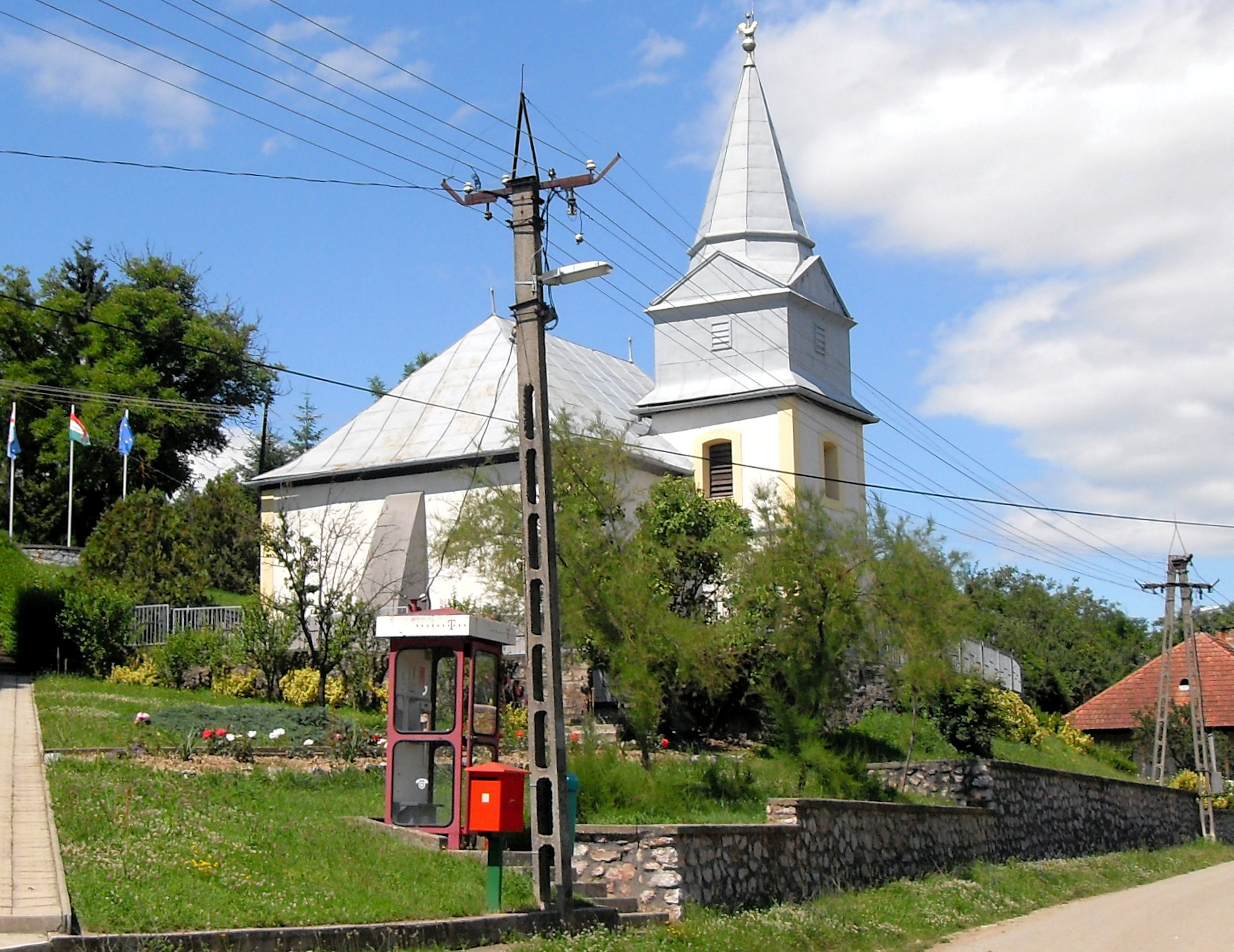 Szent Jakab Apostol templom Tornaszentjakab